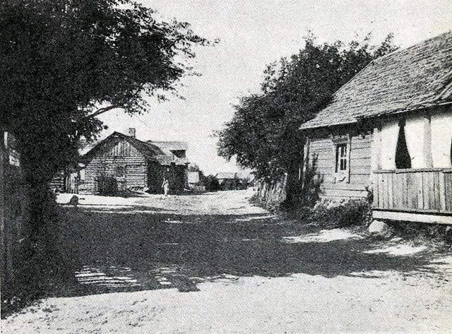 Деревня Румболово.